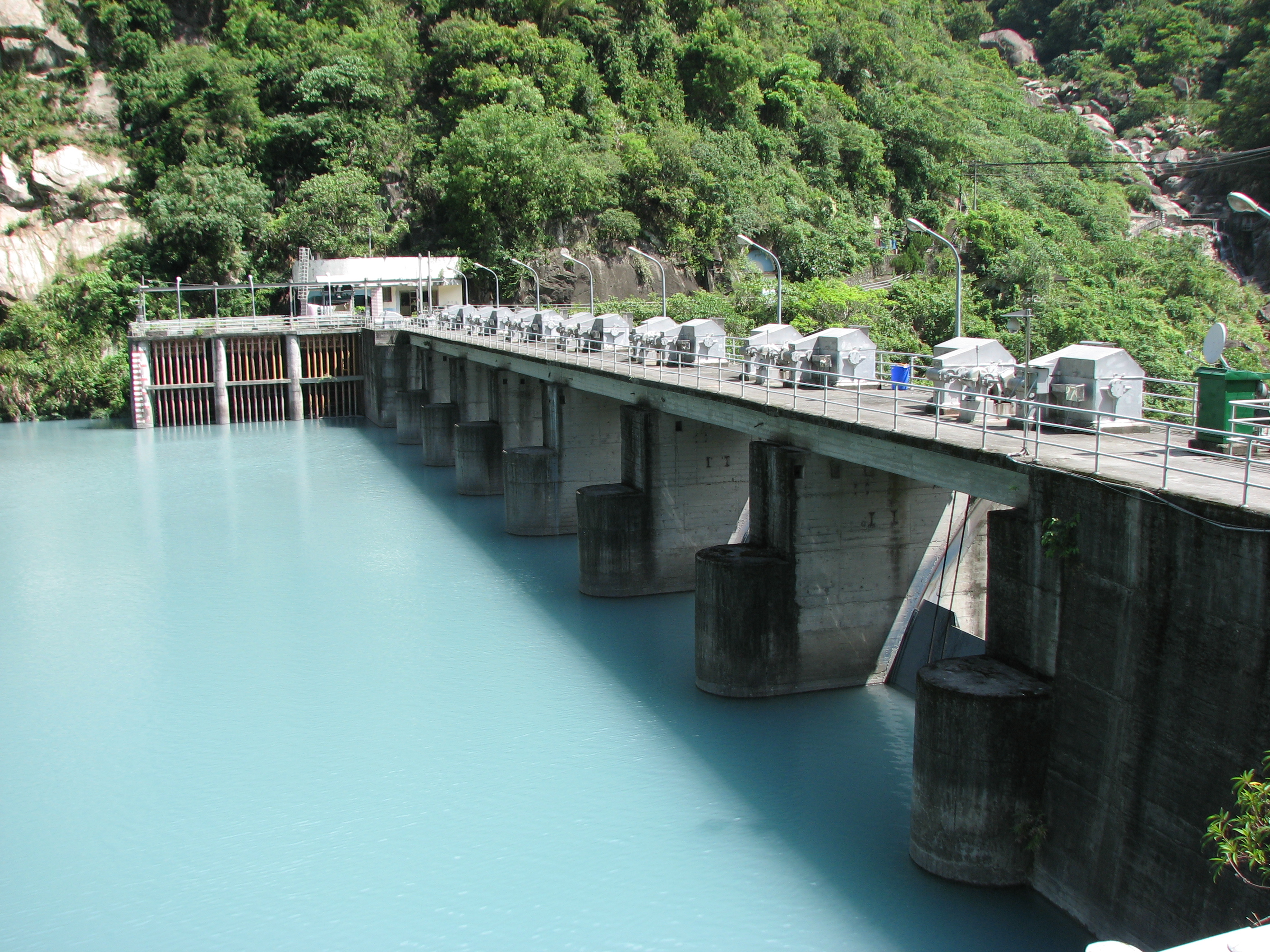 立霧溪上的溪畔壩，位於太魯閣國家公園境內